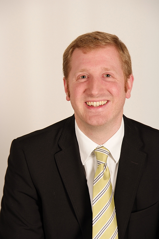 Jan-Christoph Oetjen, Landtagsabgeordneter Niedersachsen, 16. Wahlperiode (Fotoprojekt Landtagsabgeordnete Niedersachsen am 24. und 25. November 2009)